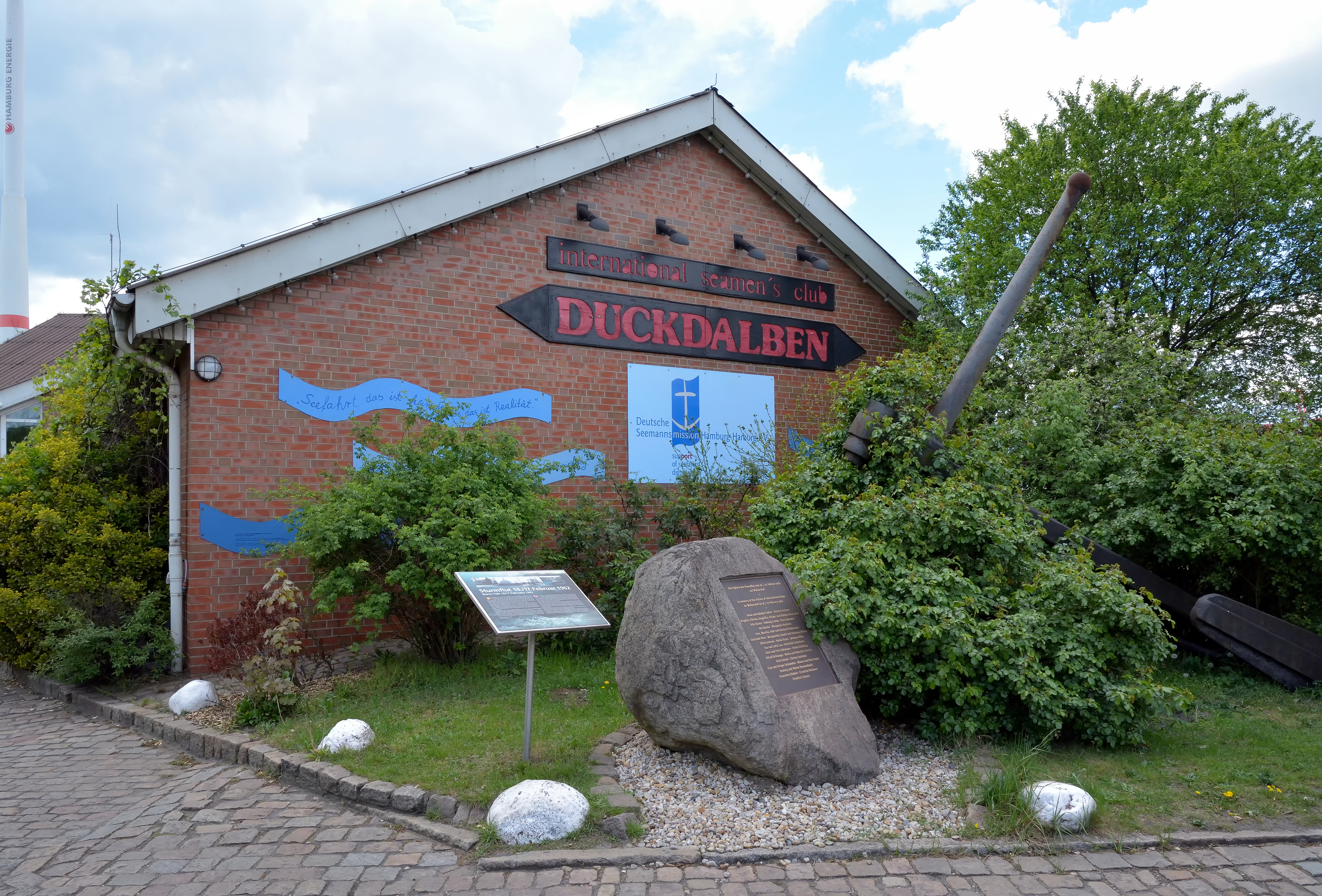 Impressionen eines Wochenendes in Hamburg mit dem Titel: Wikipedia:AhoiBilder aus dem Seemannsclub "Duckdalben".Giebel mit Erinnerung an die Toten der Sturmflut 1962